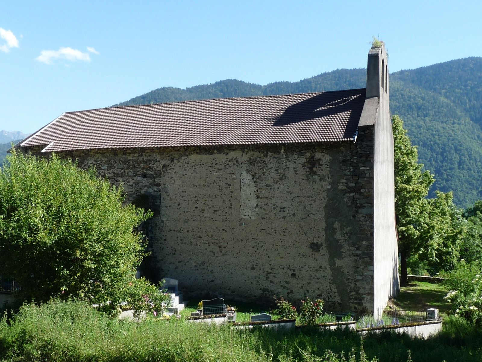 Eglise Saint-Michel de Vaychis, Ariège, France